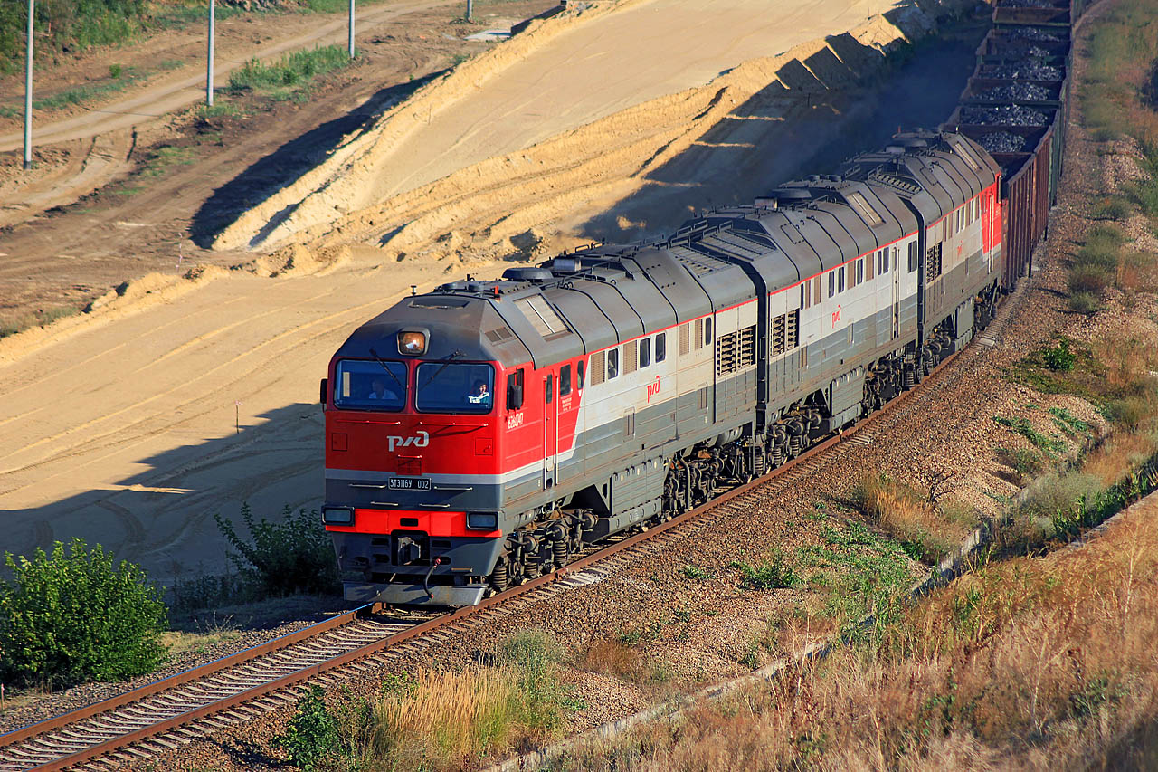 С завода поступил в депо им. Максима Горького В парк депо не принят, передан в депо Краснодар